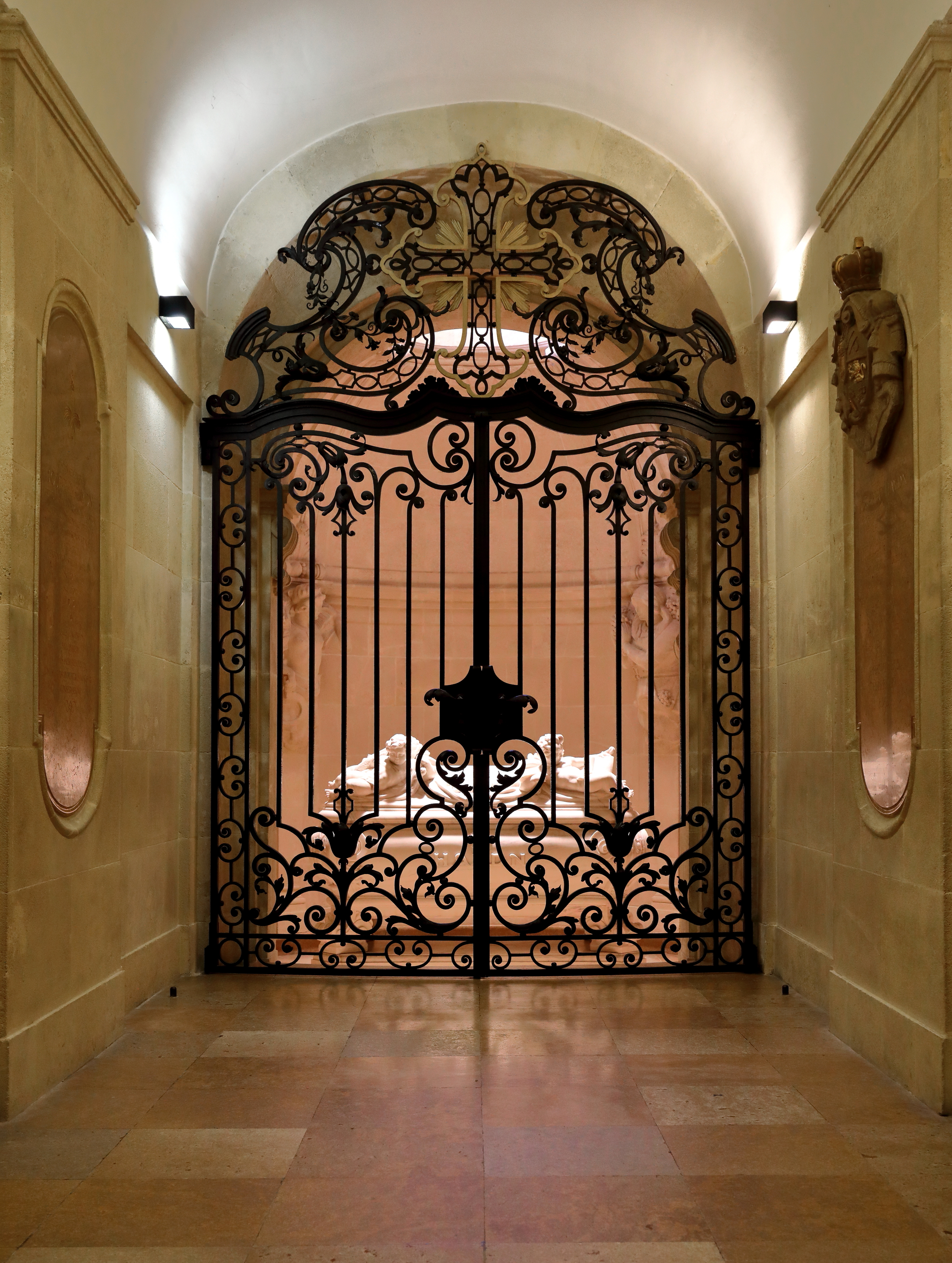 Das Haydn-Mausoleum in der burgenländischen Landeshauptstadt Eisenstadt.Das Mausoleum für den 1809 verstorbenen Musiker Joseph Haydn ließ Paul Esterházy 1932 nach Plänen des Architekten Franz Kraus im linken Seitentrakt der Bergkirche unter dem Nordturm errichten. Den Sarkophag aus weißem Marmor schuf der Bildhauer Oskar Thiede. Der Kopf Haydns konnte erst im Jahr 1954 nach einer feierlichen Prozession mit dem übrigen Skelett im Sarkophag vereint werden.